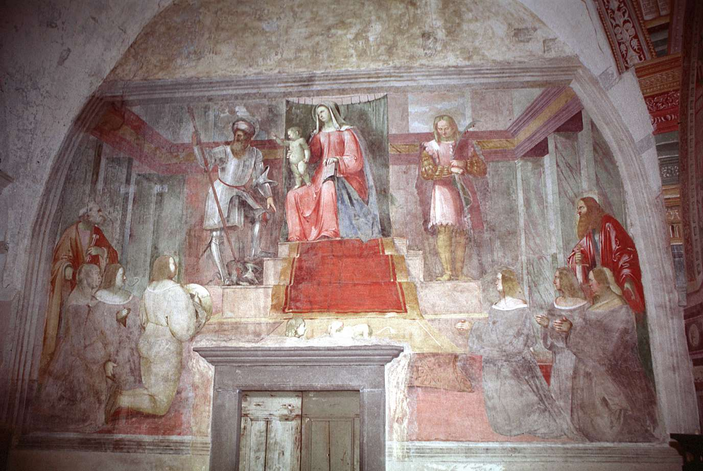 Madonna in trono col Bambino.title QS:P1476,it:"Madonna in trono col Bambino." label QS:Lit,"Madonna in trono col Bambino."